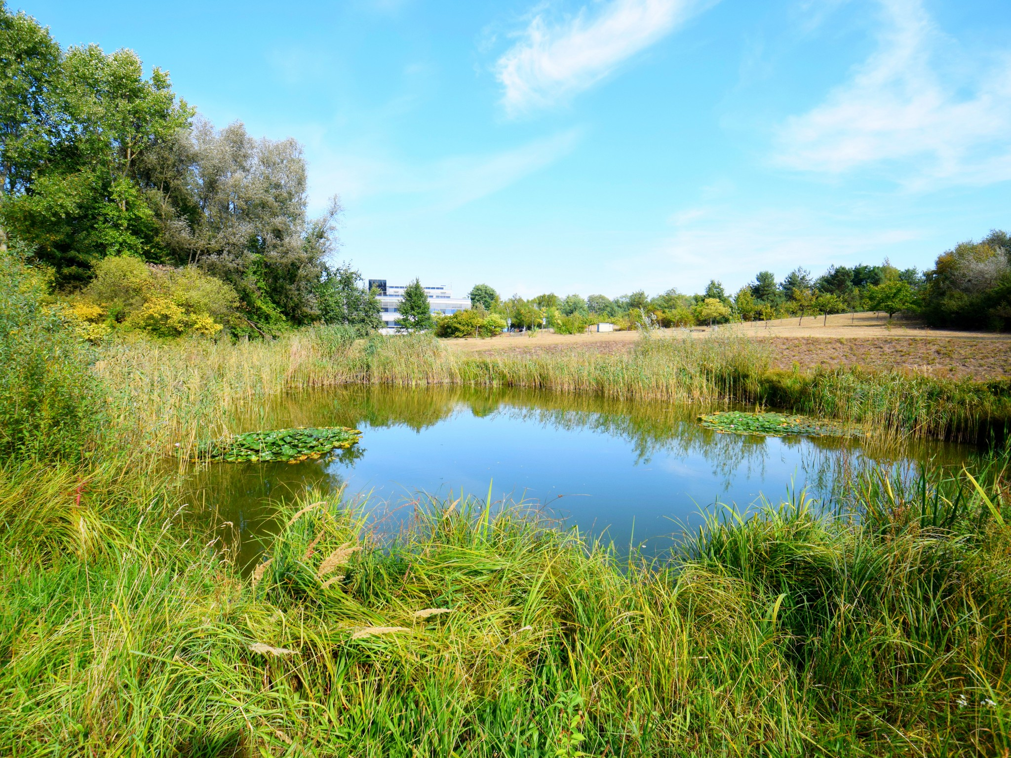 Großer Technologiepark Frankfurt (Oder)-Markendorf